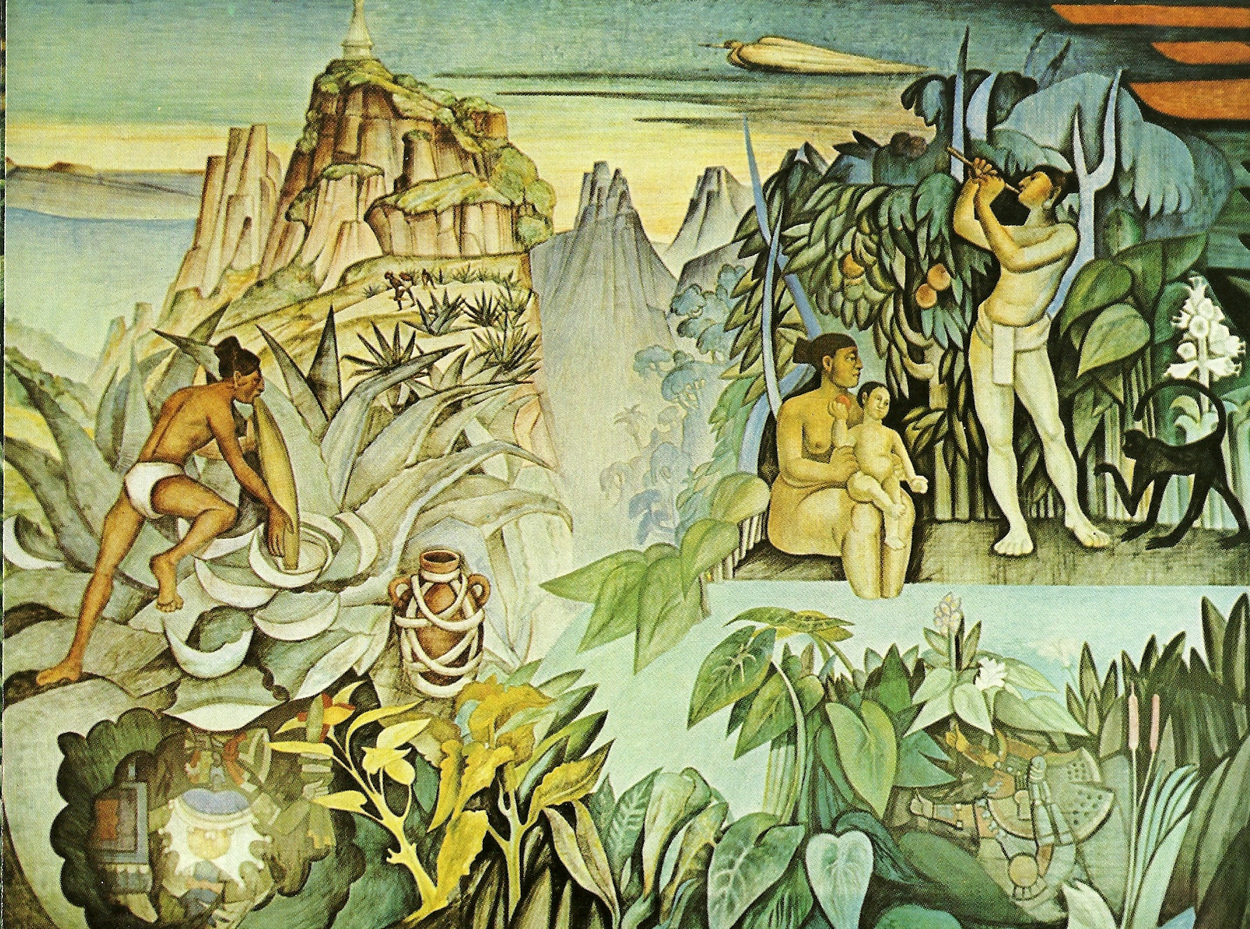 Dentro del Casino de la Selva en Cuernavaca Morelos